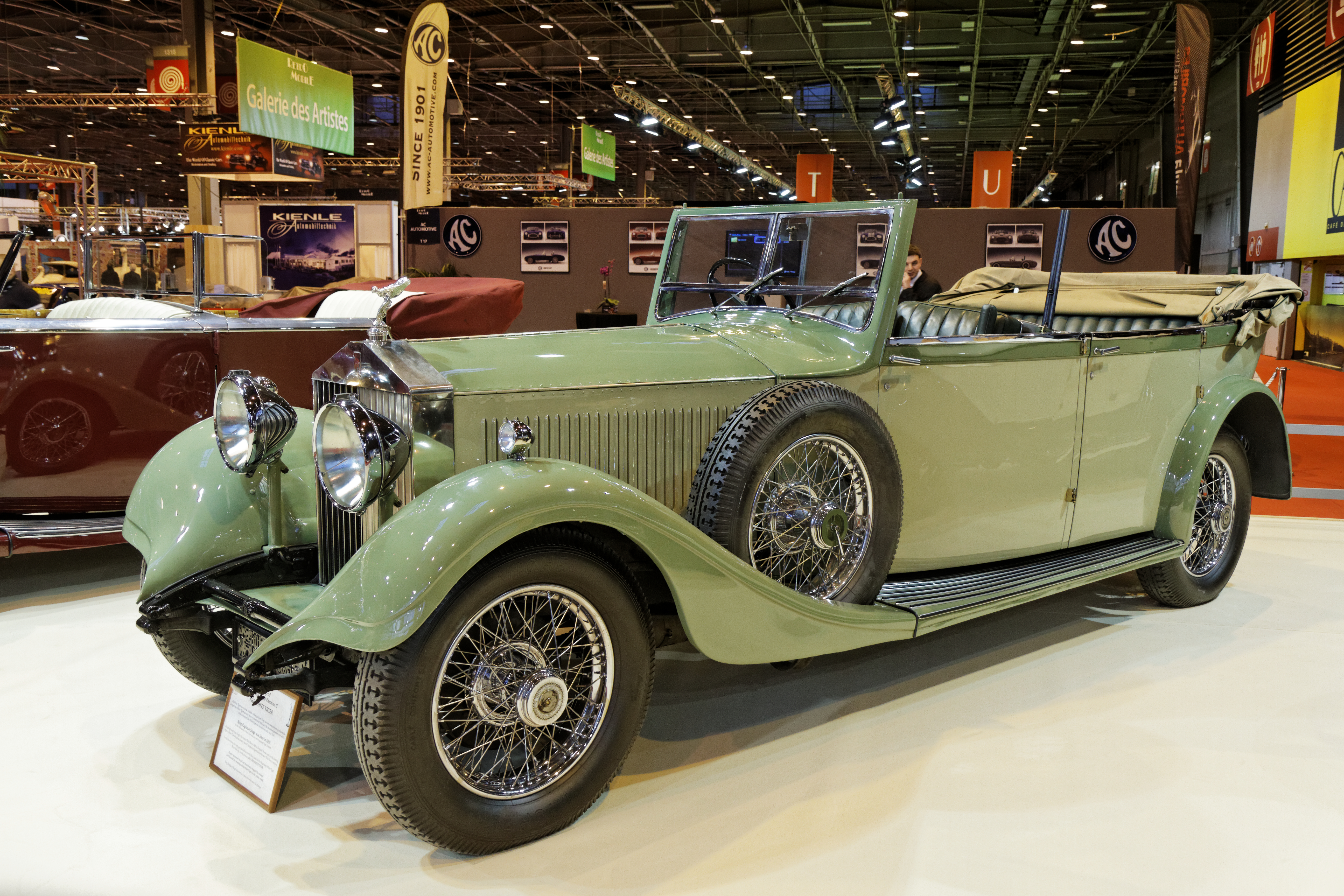 La Rolls-Royce Phantom II exposée lors du salon Retromobile 2014